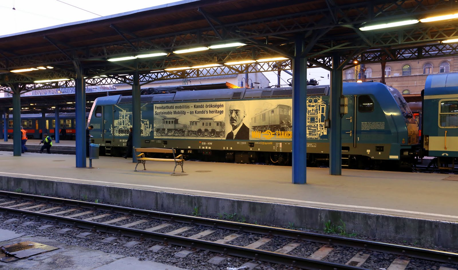 Kandó Kámán emlékét hirdeti a 480 001 mozdony